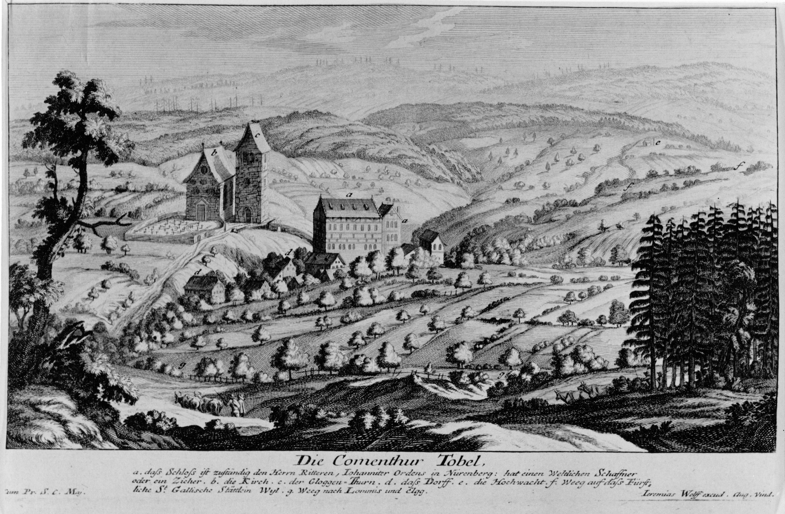 "Die Comenthur Tobel". Darstellung der Johanniterkommende Tobel auf einem Stich von Jeremias Wolff (1663-1724), zwischen 1706 und 1724.